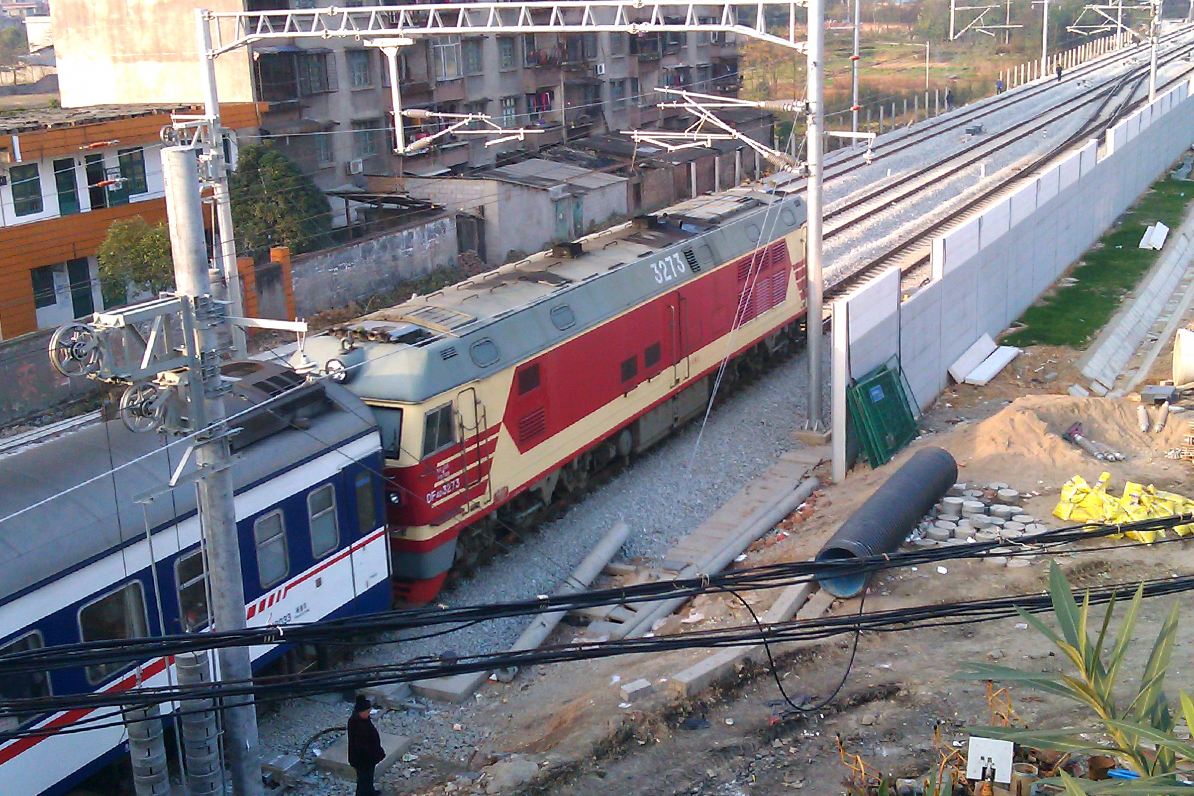 DF4D 3273牵引T190次驶离灵川站